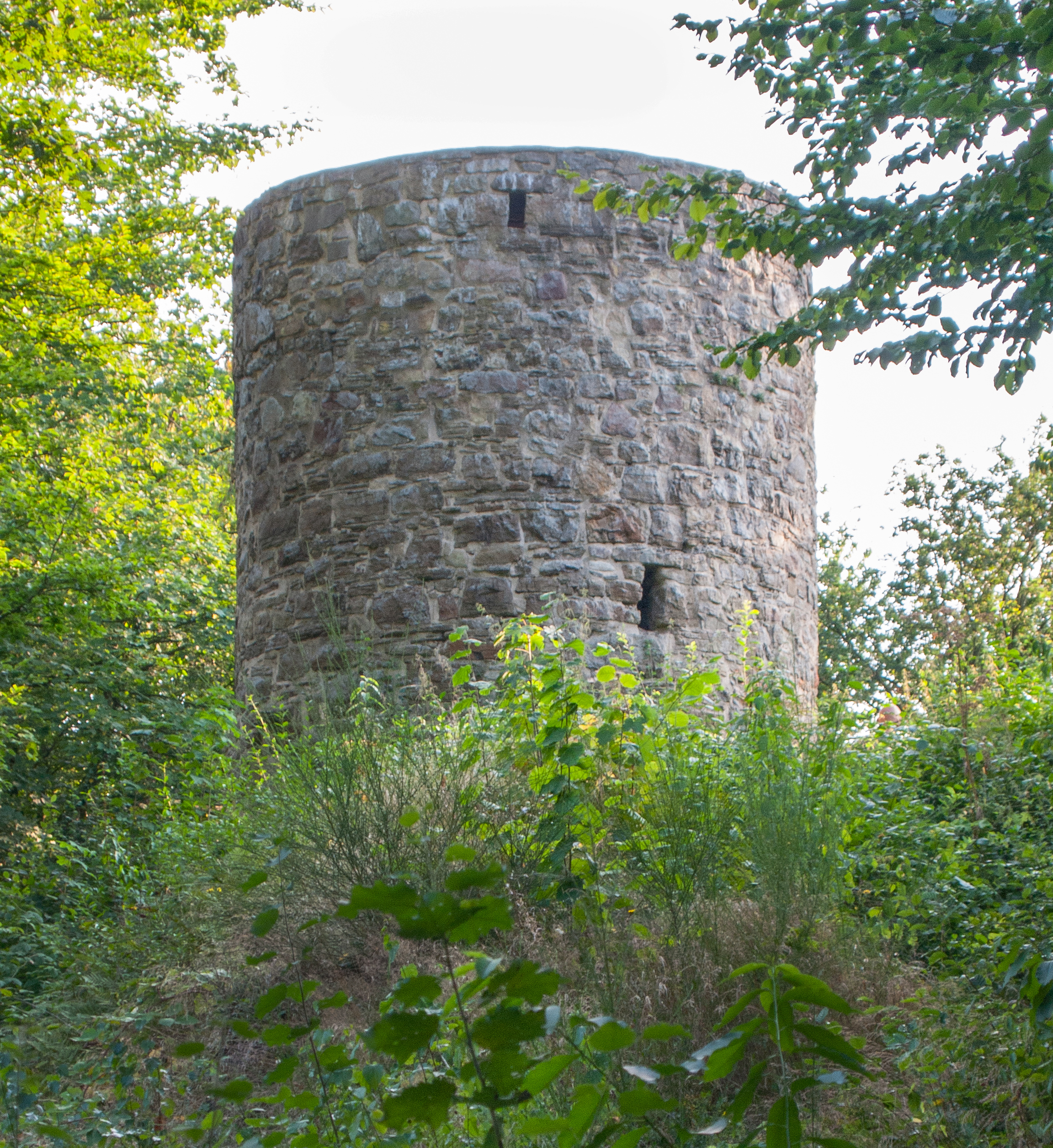 Stumpfer Turm (ehemaliger Wachturm der Stadt Salzuflen) This is a photograph of an architectural monument.